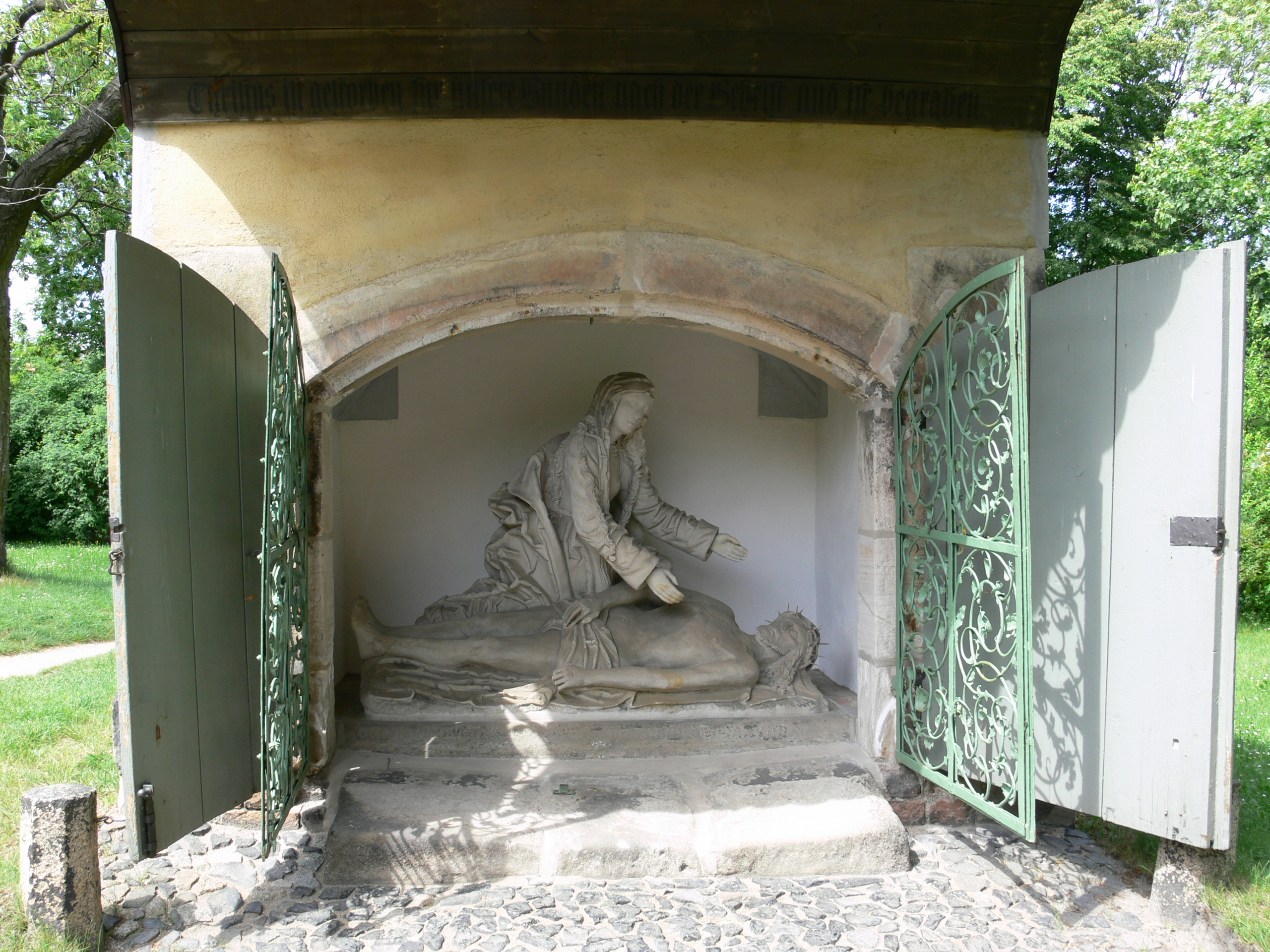 Salbhaus mit der Skulptur „Die Beweinung Jesu“ von Hans Olmützer, Heiliges Grab, Görlitz